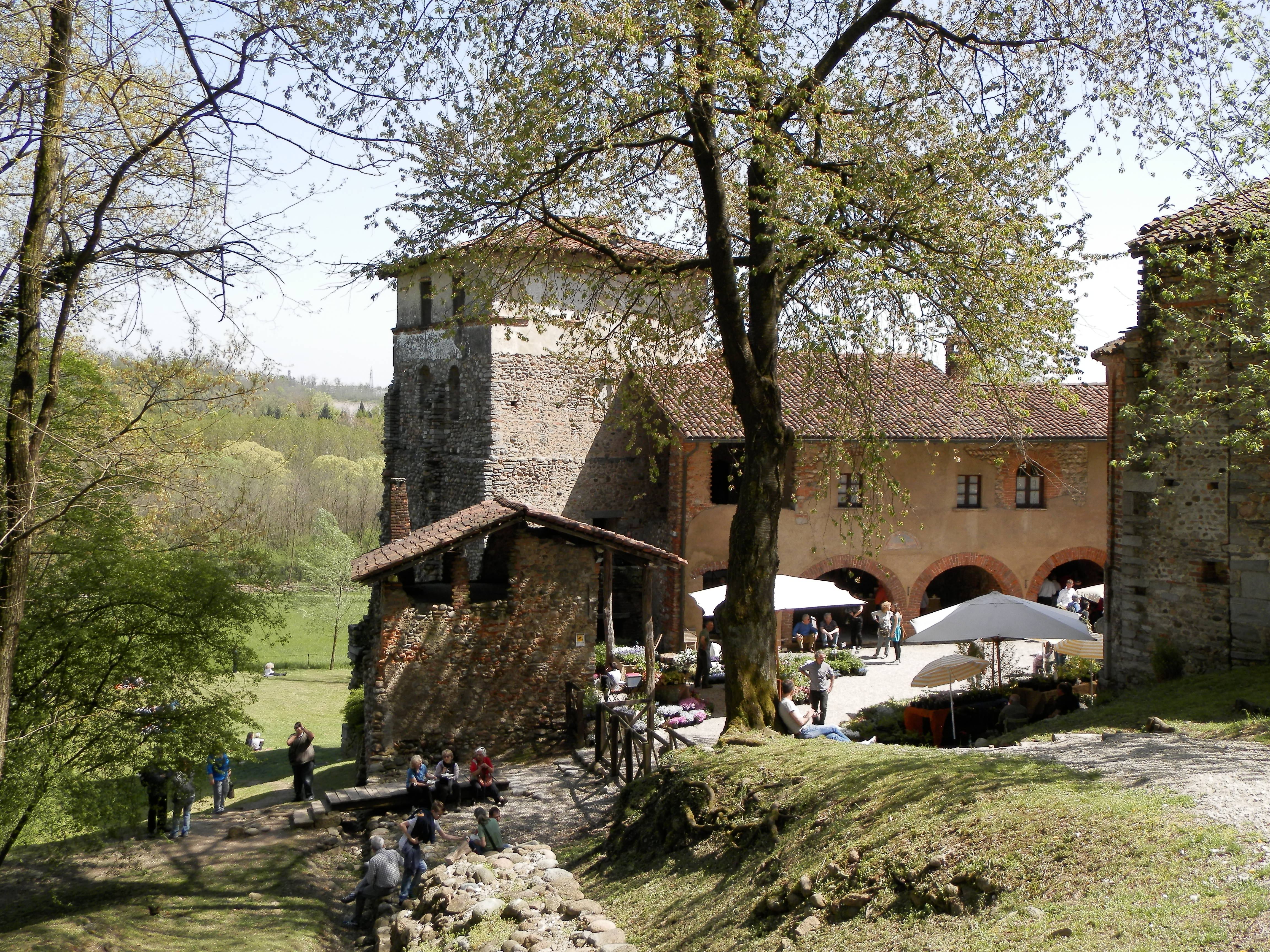 vista del monastero dal retro del parco